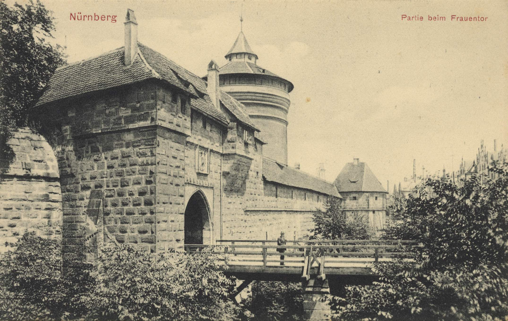 Frauentor der Nürnberger Stadtmauer